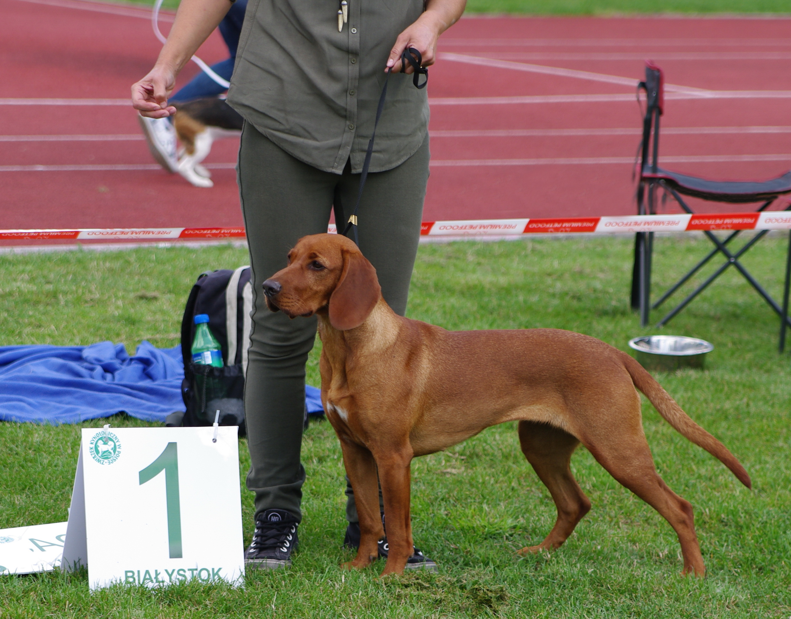 Стандартный, но редкий цвет окраса польской гончей.